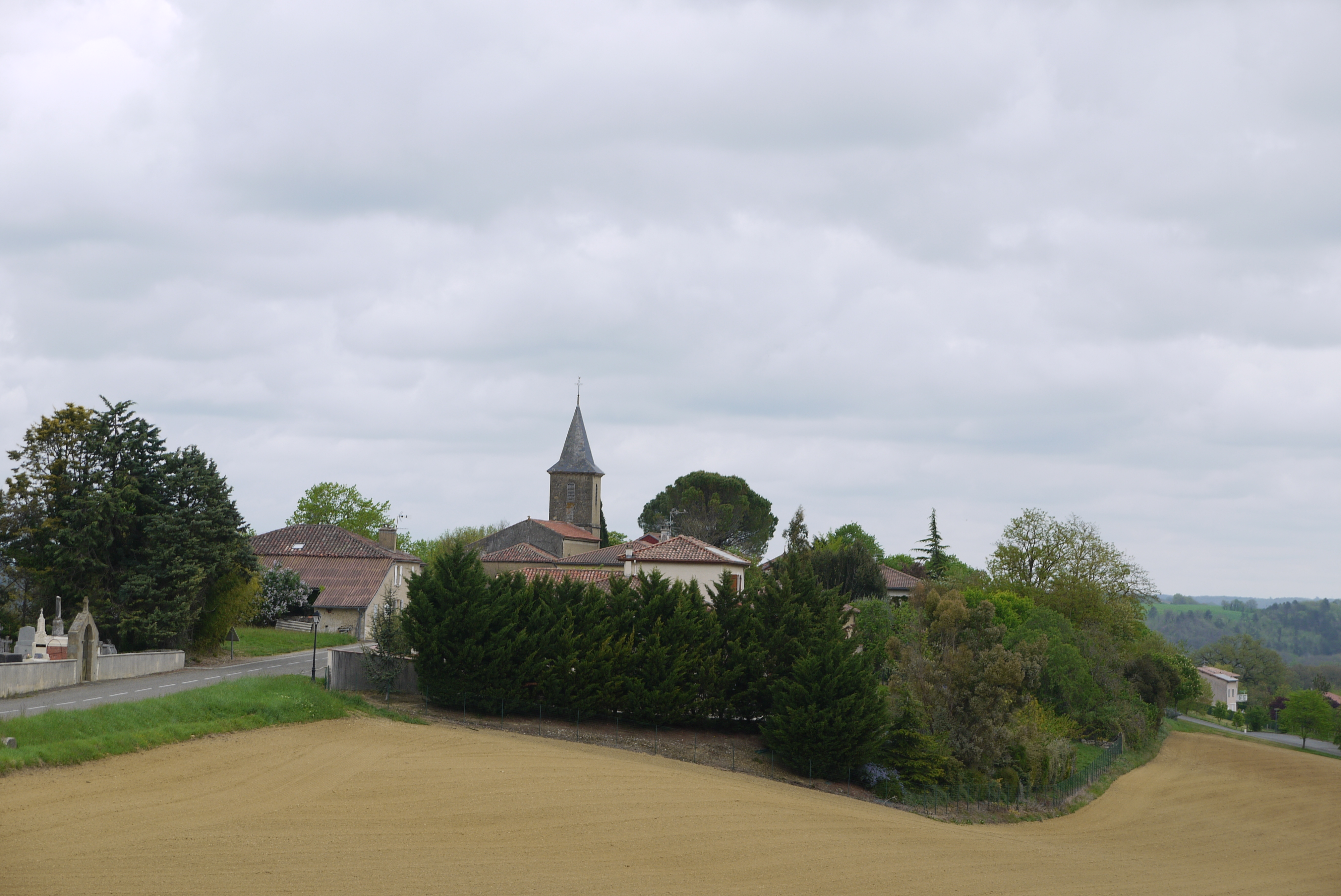 Vue de Saint-Jean-le-Comtal depuis l'ouest.